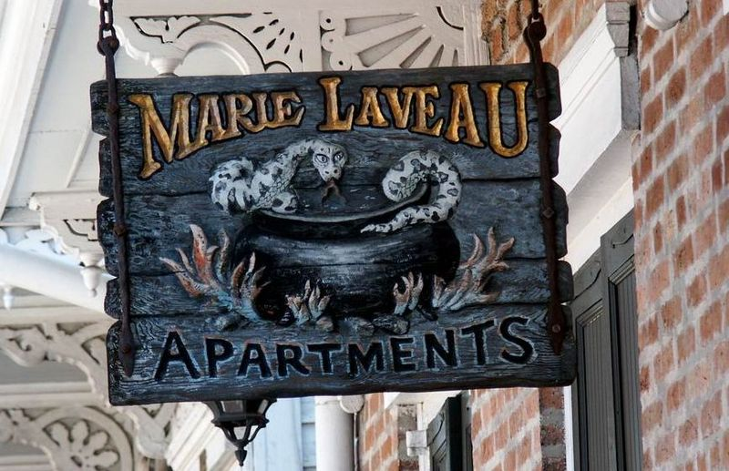 Enseigne sur la façade de la maison Marie Laveau à La Nouvelle-Orléans en Louisiane.